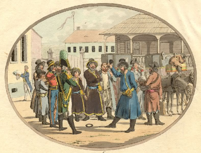 "Malerische Darstellungen der Sitten, Gebräuche und Lustbarkeiten bey den Russischen, Tatarischen, Mongolischen und anderen Völkern im Russischen ReichSwaika". Swaika